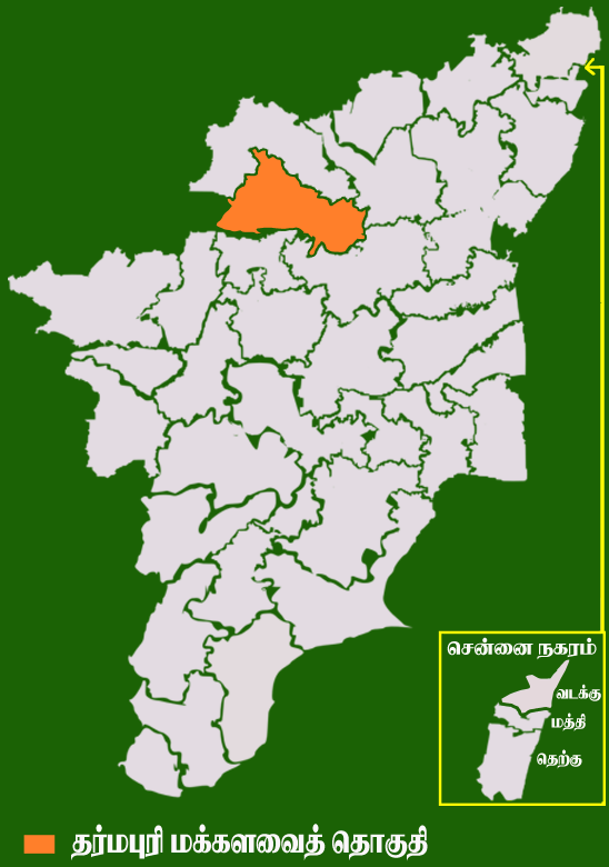 தமிழக வரைபடத்தில் உள்ள தர்மபுரி மக்களவைத் தொகுதி